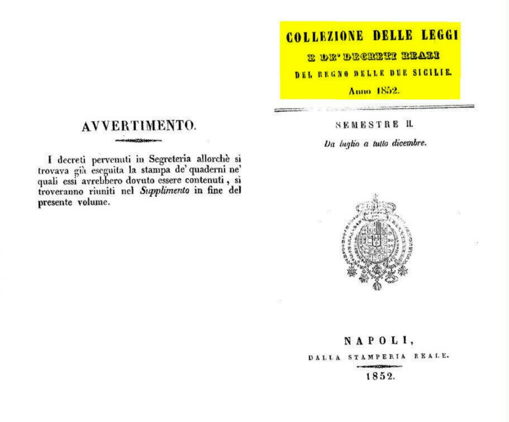 Frontespizio Leggi e Decreti 1852. Autorizzato alla pubblicazione dal detentore del possesso.